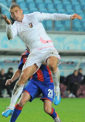 Pajtim Kasami